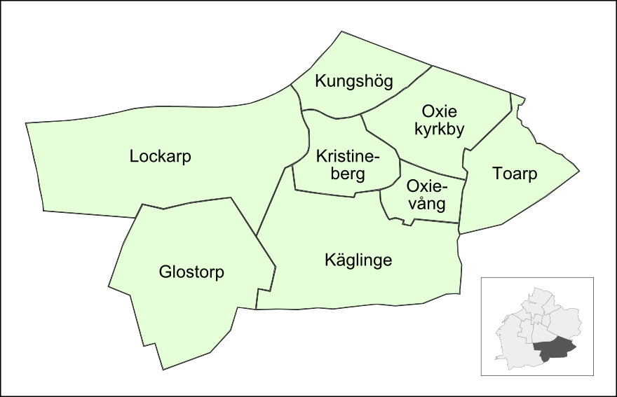 Delområden i Oxie, Malmö 2009